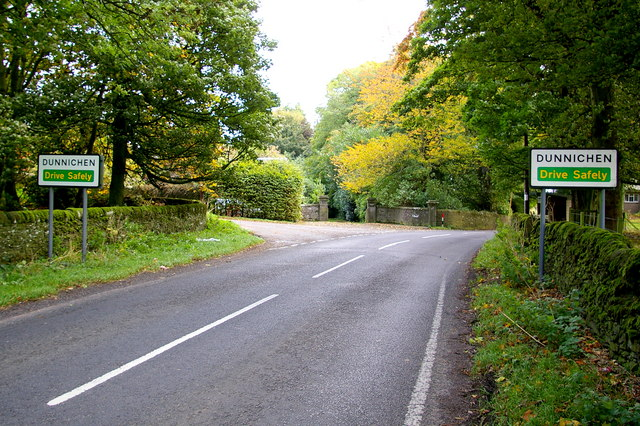 Entering Dunnichen Village from Forfar